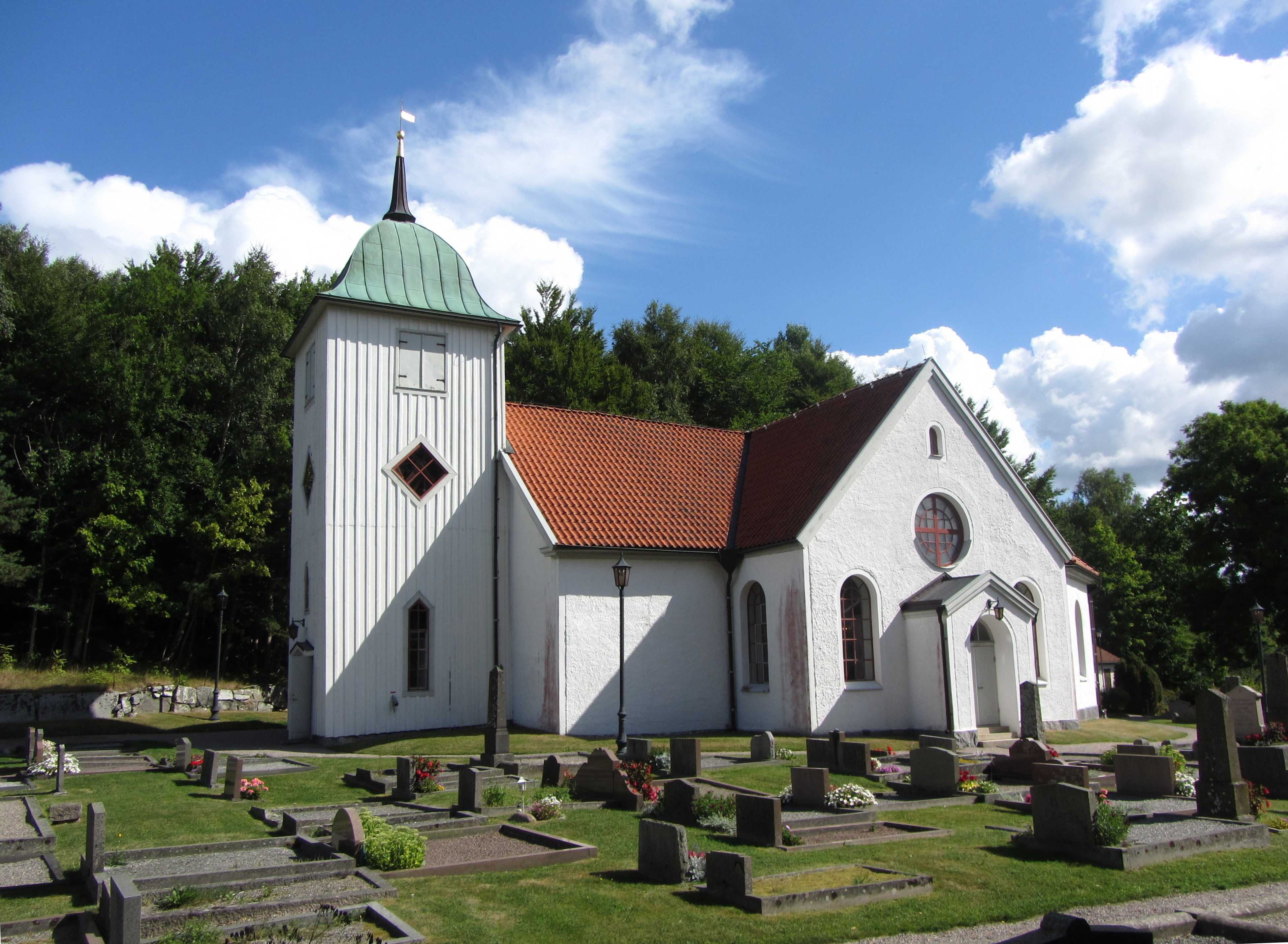 Spekeröds kyrka den 4 augusti 2013.